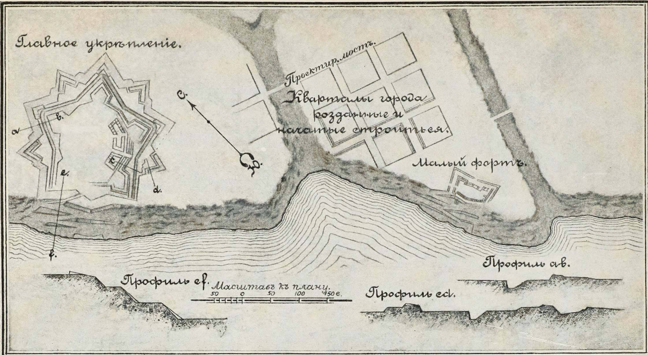 Карта укріплень Хаджибею